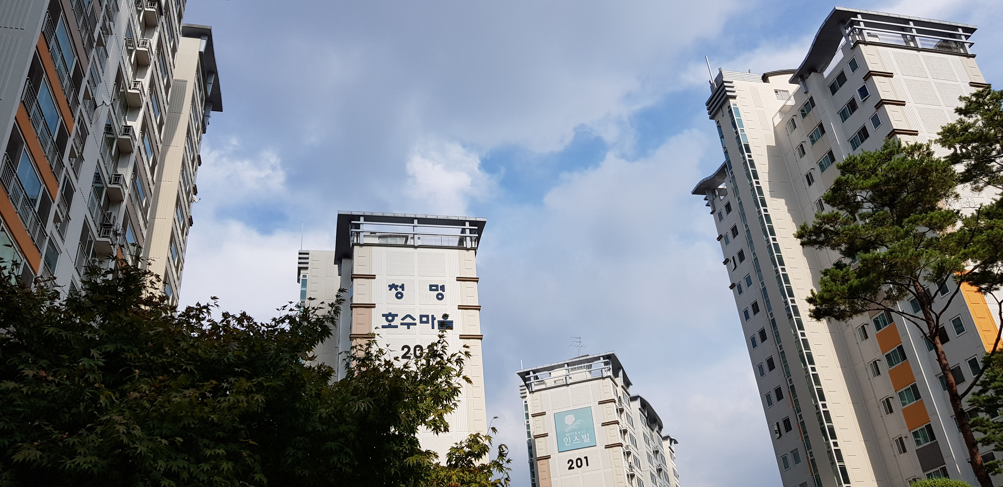 푸른하늘아래 아파트의 모습, 용인시, 청명호수마을